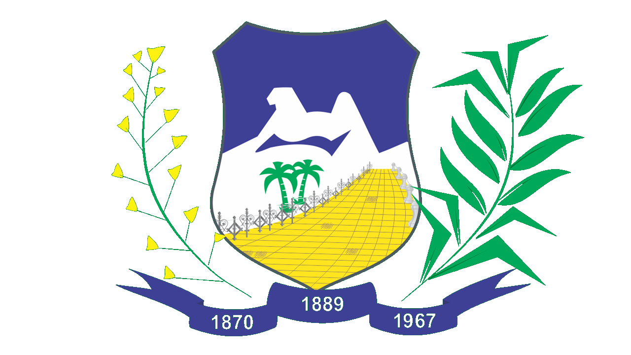 Brasão da cidade de Quixadá-CE